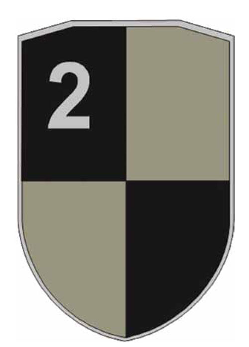 Oznaka rozpoznawcza na mundur polowy 2. batalionu logistycznego "Ziemi Żnińskiej" w Bydgoszczy